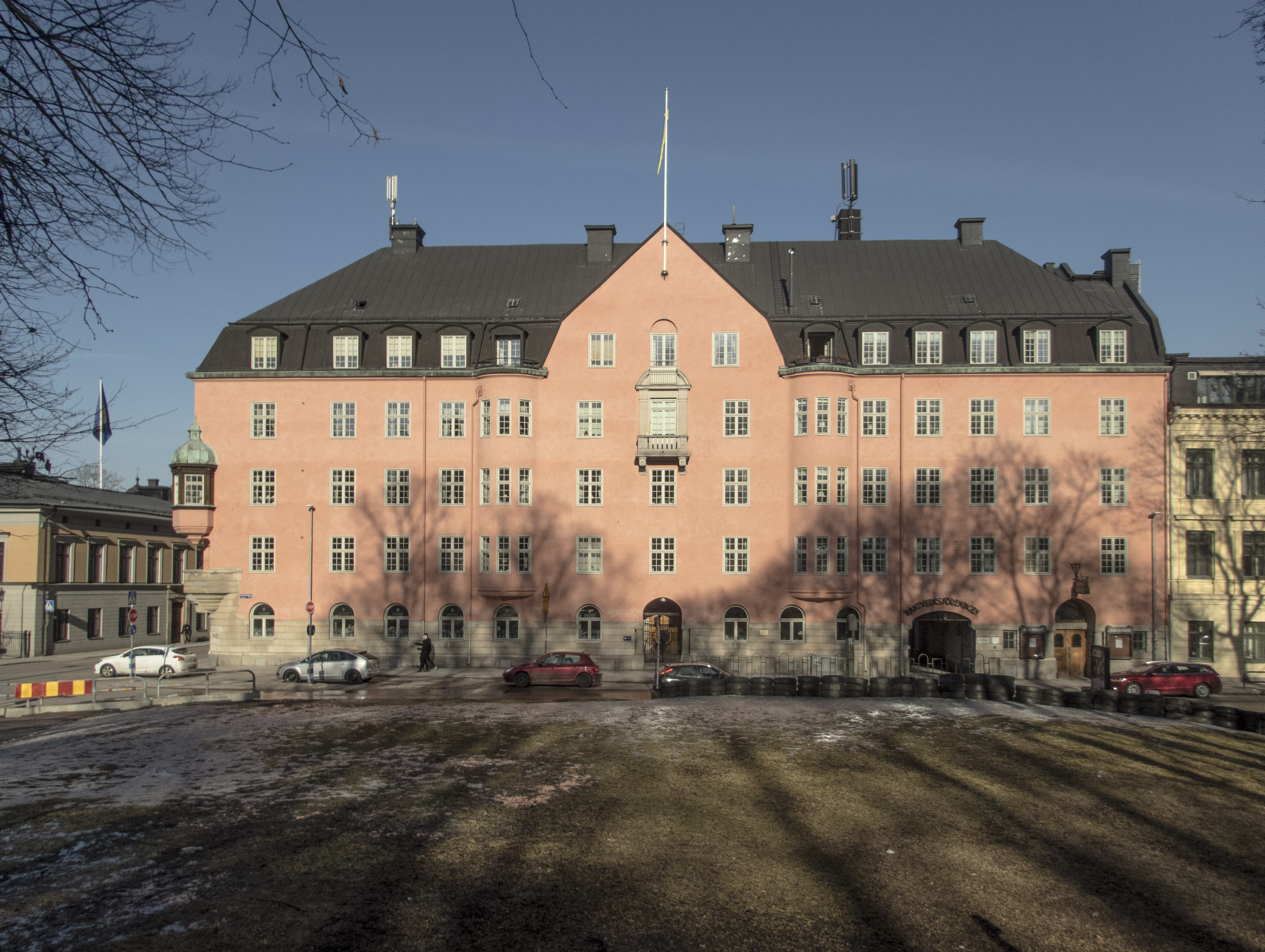 Hantverksföreningens borg, Drottninggatan 14 , Nedre Slottsgatan 6 Uppsala Nybyggnadsår 1913 - 1914. Byggherre Upsala Fabriks- och Hantverksförening. Arkitekt Victor Holmgren